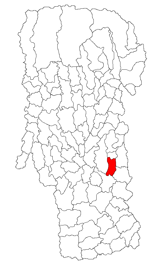 Categorie:Hărţi ale judeţului Argeş